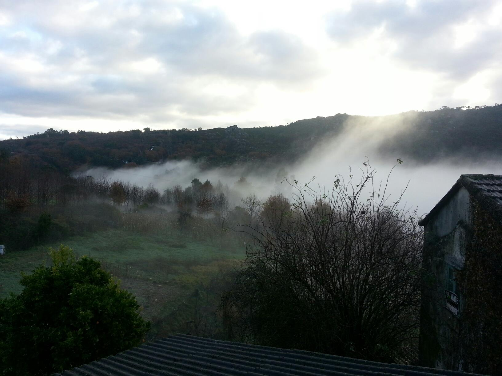 Imagen Lama de Torno, Lobios (Ourense)